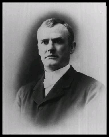 Bildbeschreibung: Ex-Gouverneur Ferguson (Oklahoma)